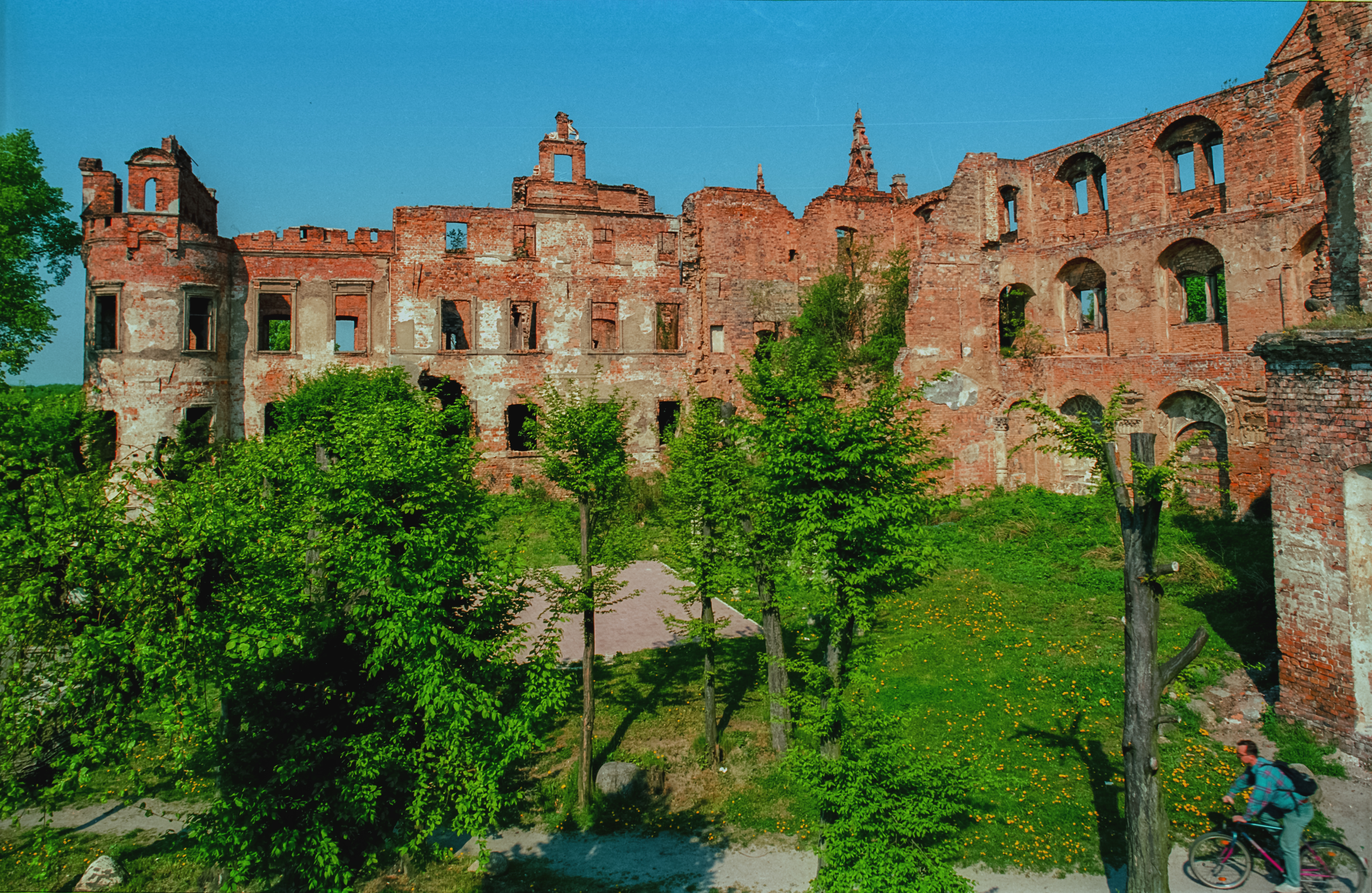 Ruine von Schloss Carolath Siedlisko